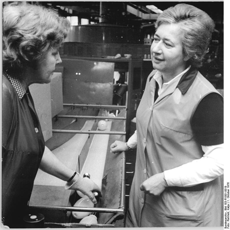 ADN-ZB-Rehfeld-1.10.1976-Hü-Berlin: Wahlen-Seit 1962 ist die Technologin Ilse Wedel (r., parteilos) aus dem VEB Kombinat Narva Berlin Schöffin des Sents für Arbeitsrecht am Obersten Gericht der DDR. Sie ist Mitglied der Betriebsgewerkschaftsleitung und der Konfliktkommission. Die 45jährige Ilse Wedel ist seit 26 Jahren im Betrieb tätig und wird von ihren Kollegen sehr geschätzt. Als Verantwortliche für die Fertigungsüberwachung in der Abteilung Hochdrucklampe hat sie wesentlichen Anteil an den guten Wettbewerbsergebnissen. (beachten Sie auch Foto R1001-20N)